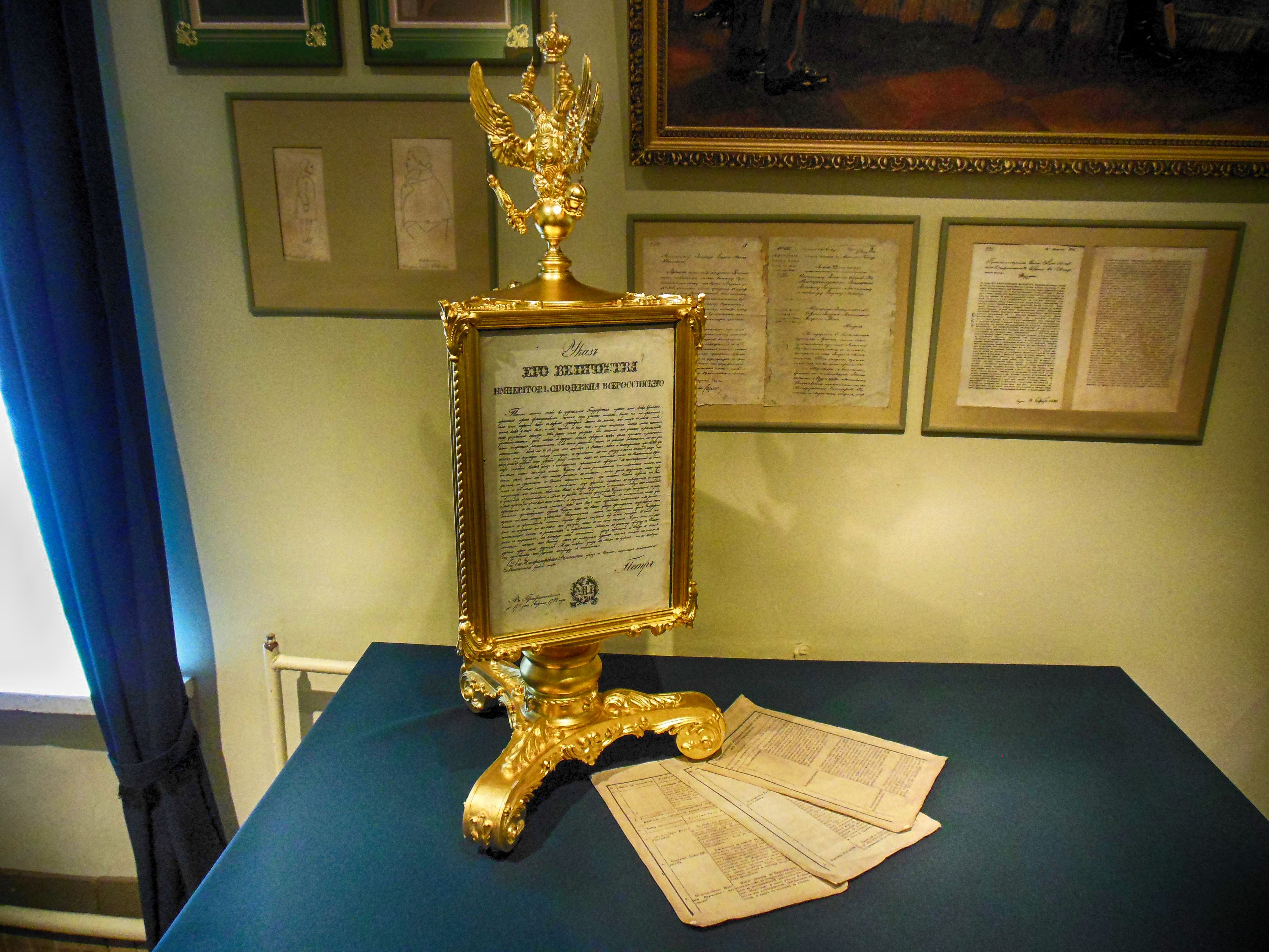 Беларуская (тарашкевіца): Магілеўскі музэй этнаграфіі, экспазыцыя -Губернскі Магілеў